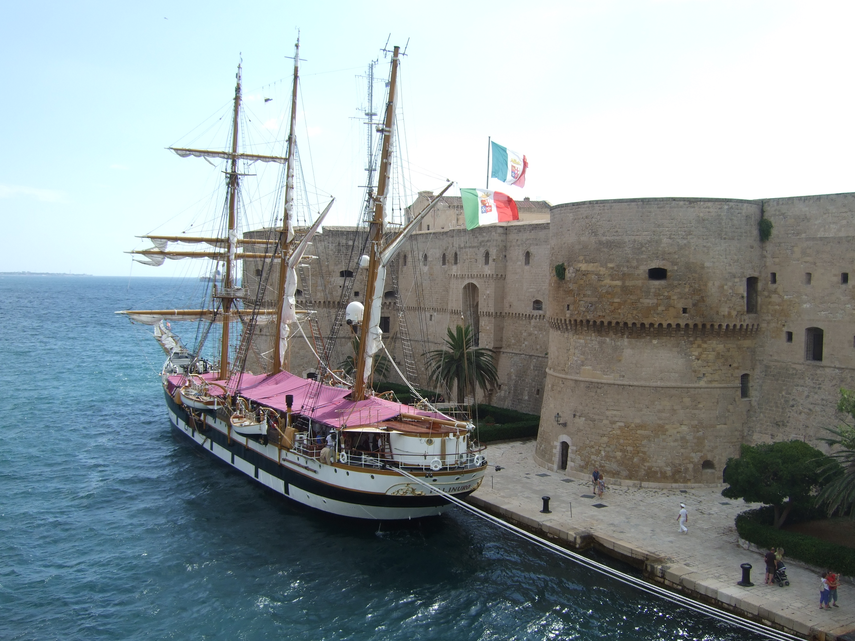 ターラントに停泊中の船を橋の上から撮影